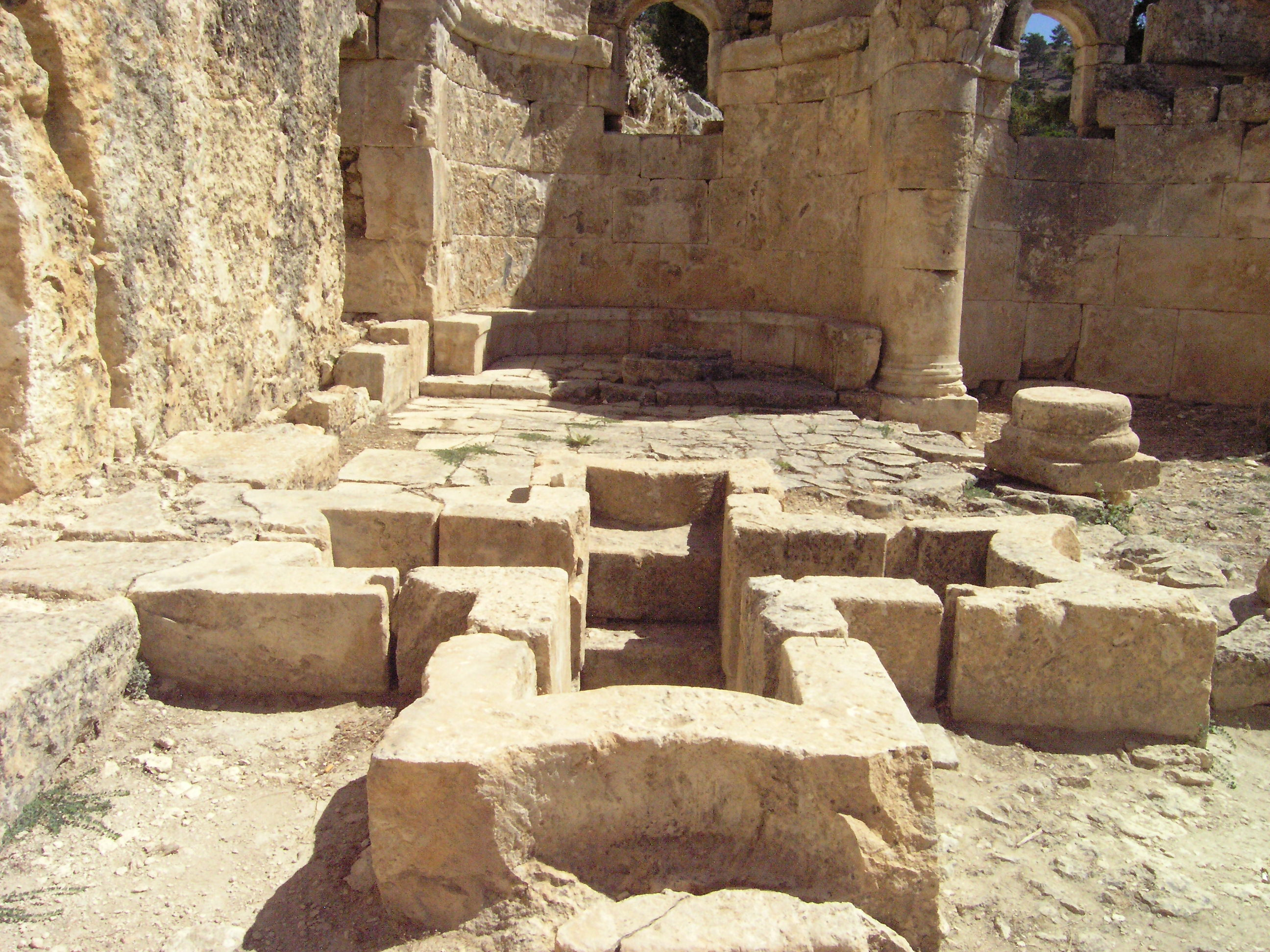 Alahan "Kloster", frühbyzantinische Pilgeranlage in der Türkei (Provinz Mersin), Baptisterium, Taufbecken